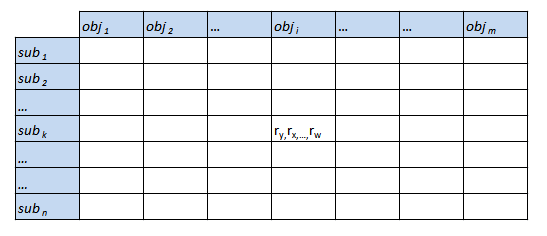 Описывает доступ субъектов к объектам